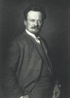 Porträt des Photochemikers Adolf Miethe.